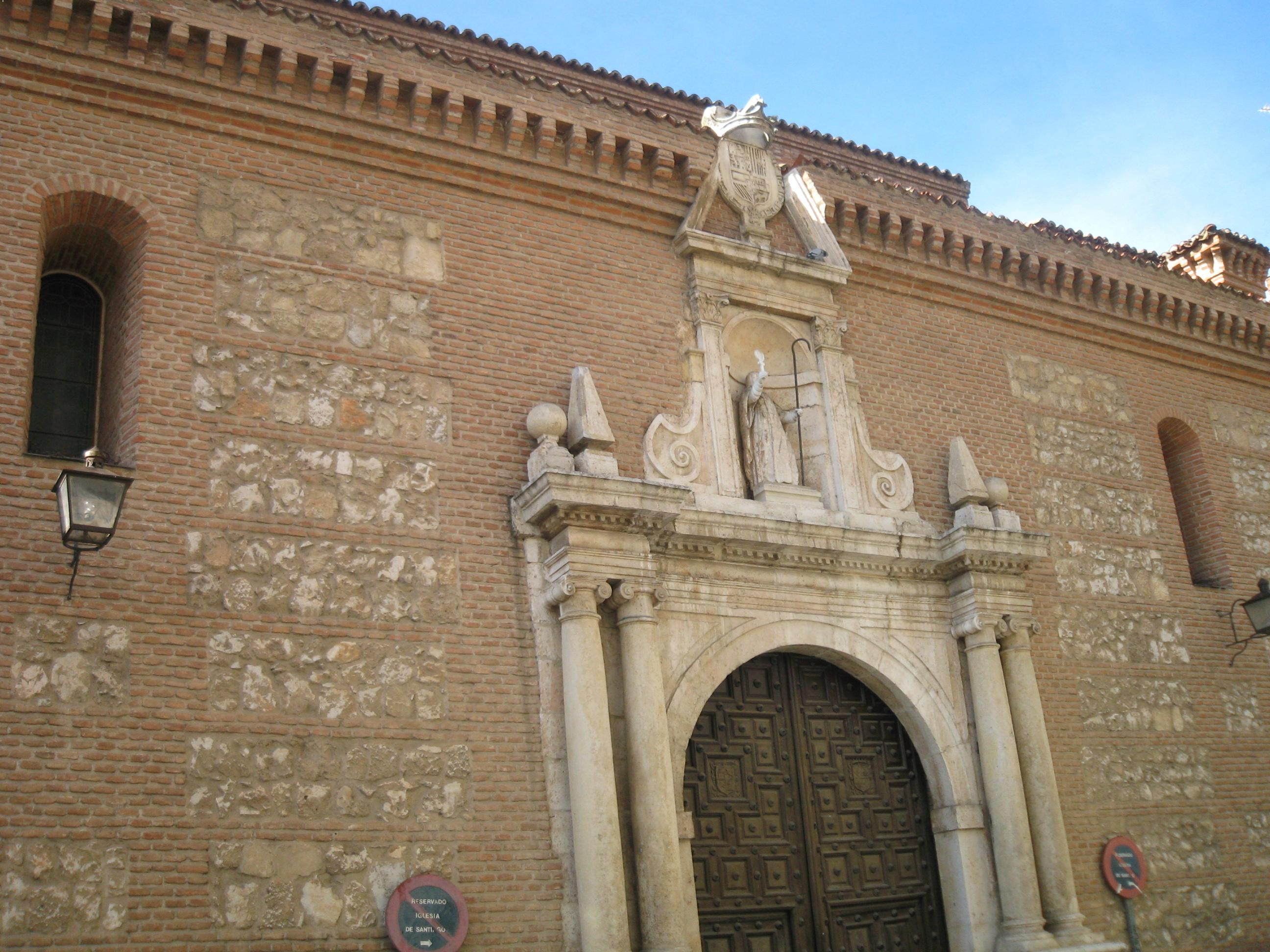 Iglesia de Santiago in Guadalajara, Spain